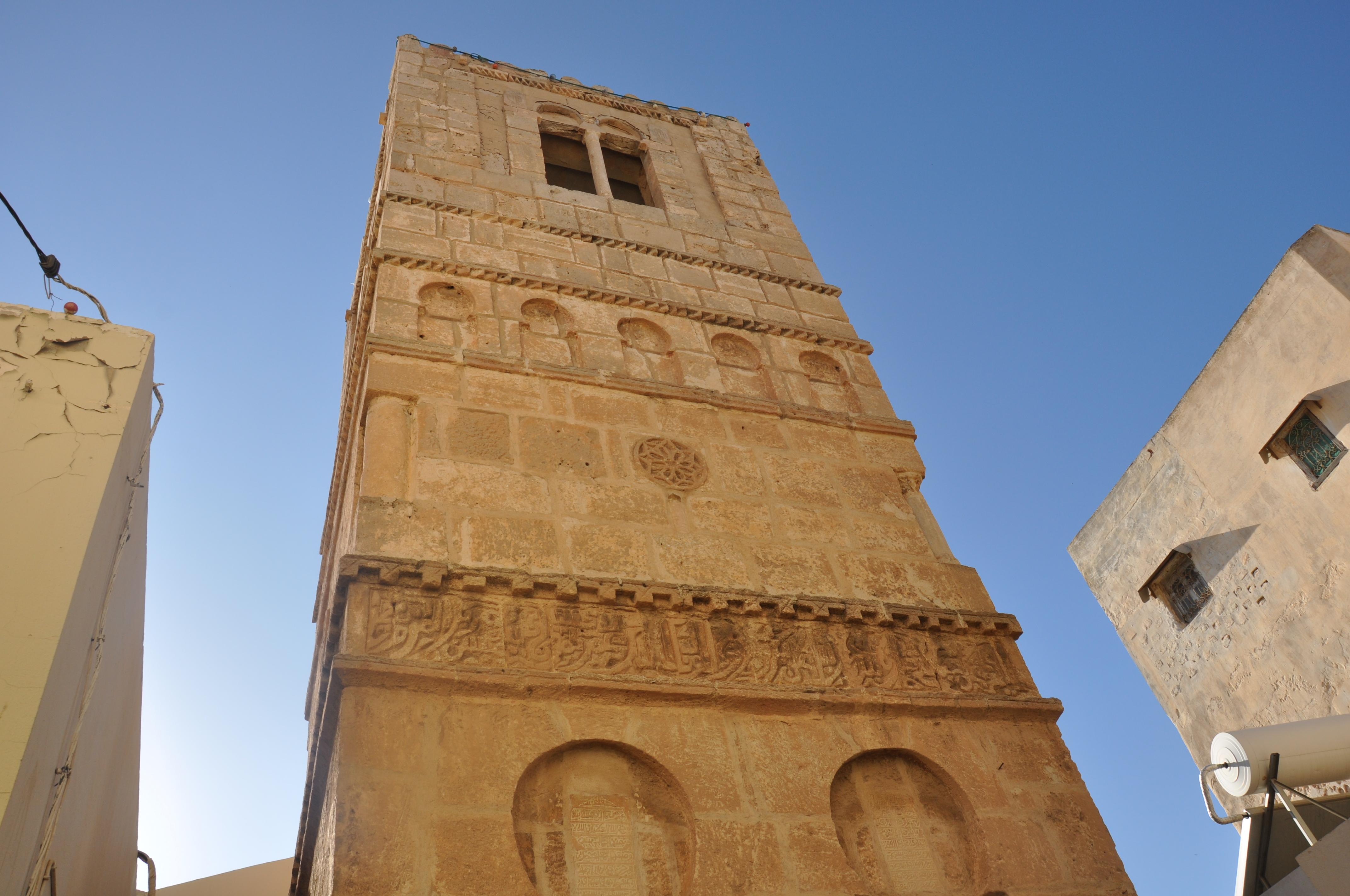 Mosquée de Sidi-Amor